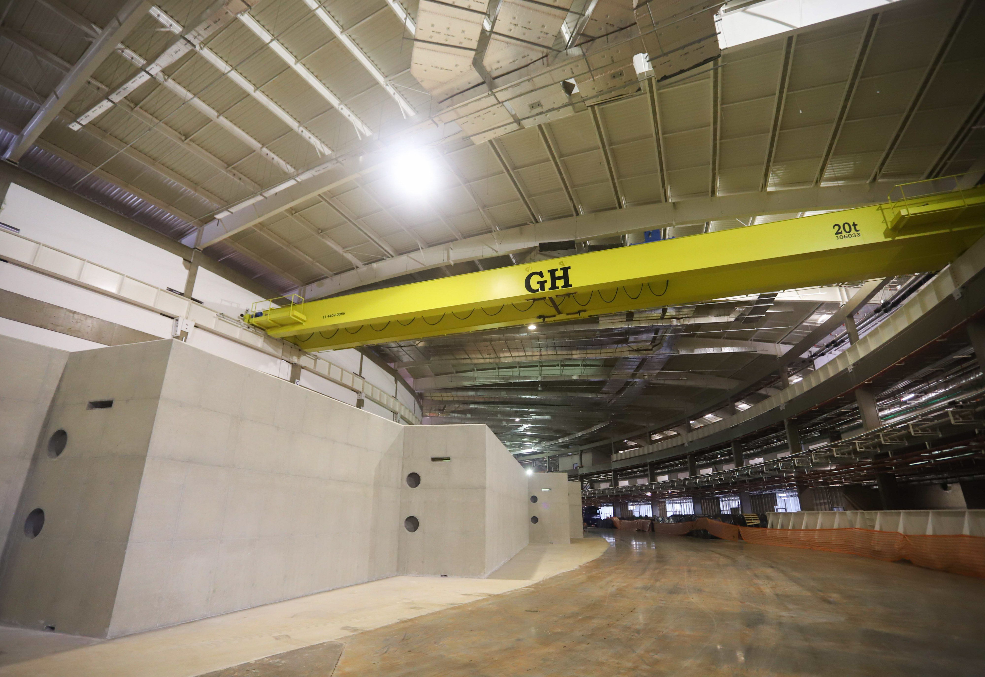 O Governador do Estado de São Paulo, Geraldo Alckmin, participa de visita ao Projeto Sirius, no CNPEM. Local: Campinas/SP Data: 15/02/2018 Foto: Governo do Estado de São Paulo